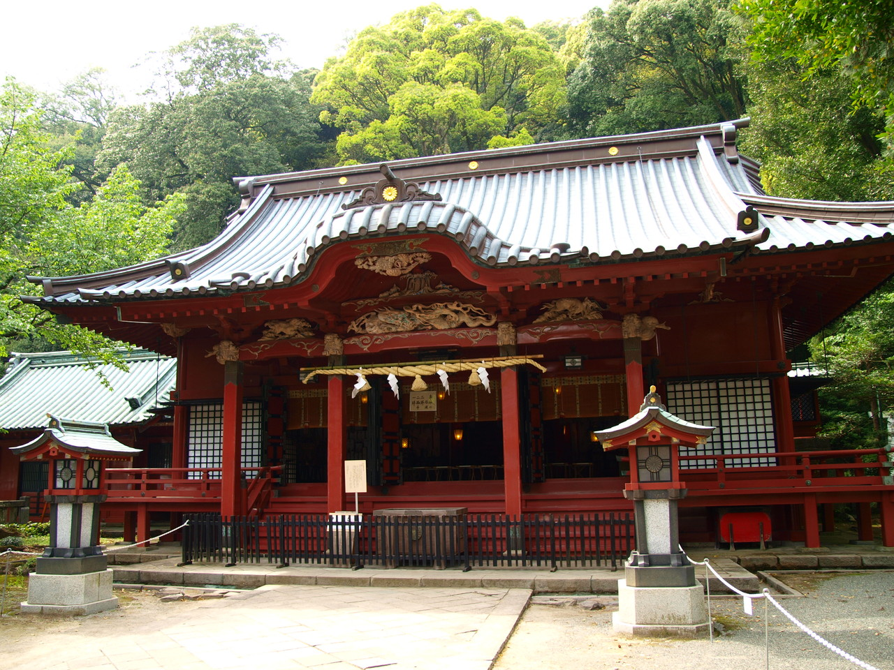 静岡県熱海市にある伊豆山神社の本殿